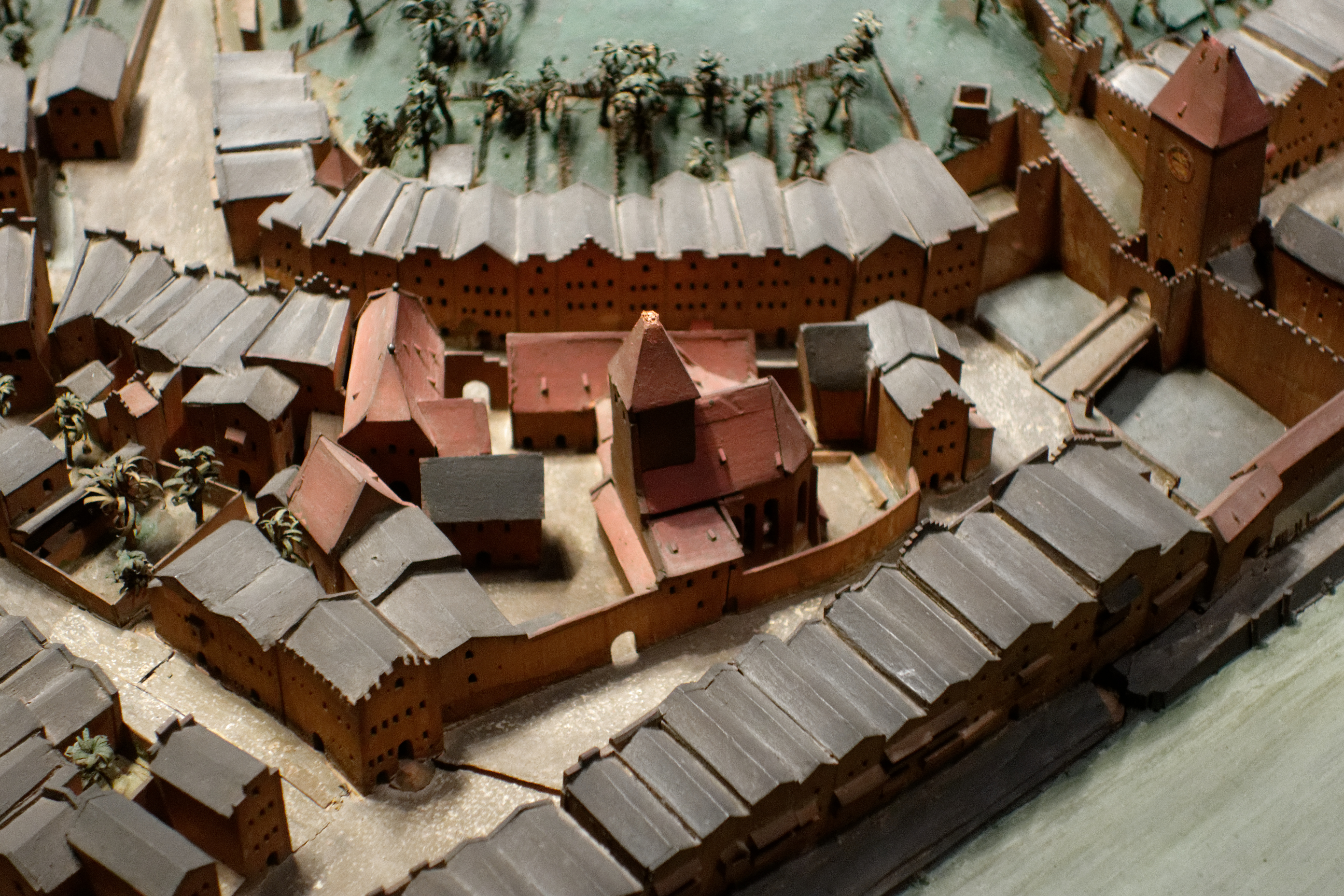 Heilig-Geist-Spital im Sandtnermodell von Burghausen (1574) im Bayerischen Nationalmuseum